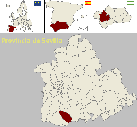 Mapa de localización del municipio sevillano de Las Cabezas de San Juan (Andalucía, España)